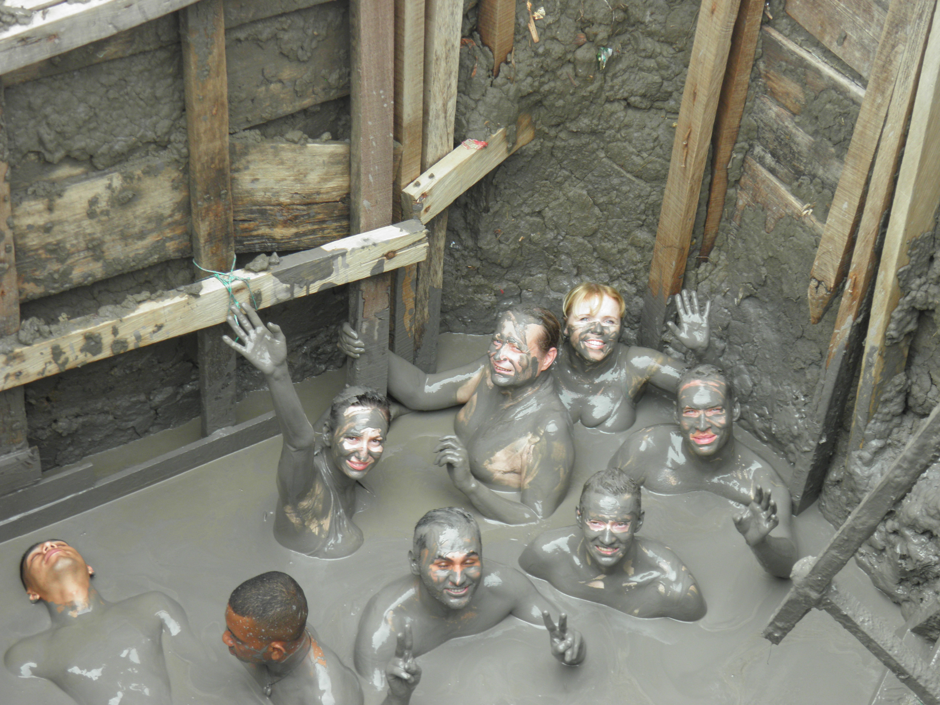 Bahenní lázeň v nitru bahenní sopky El Totumo